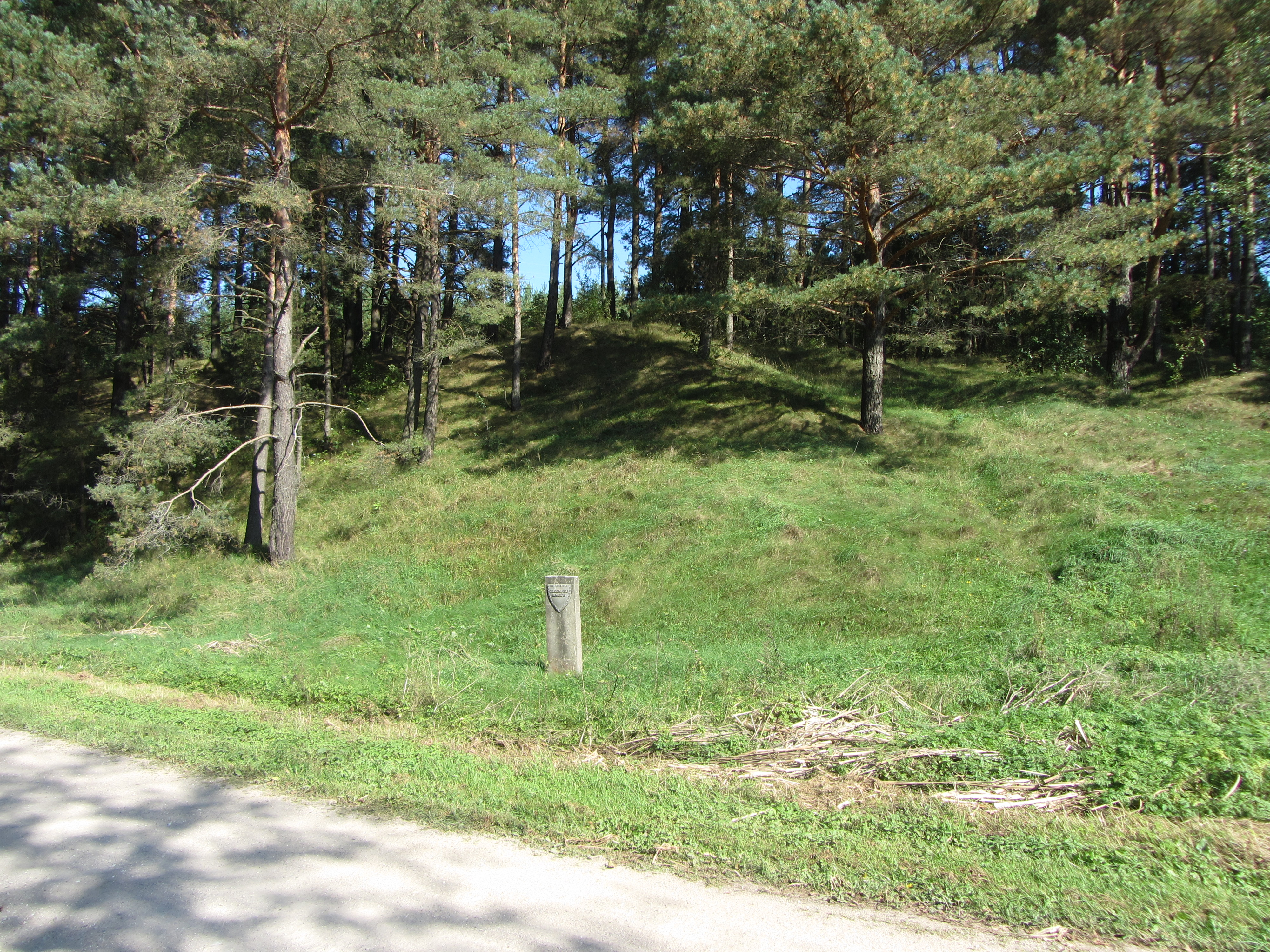 Grendavės sen., Lithuania